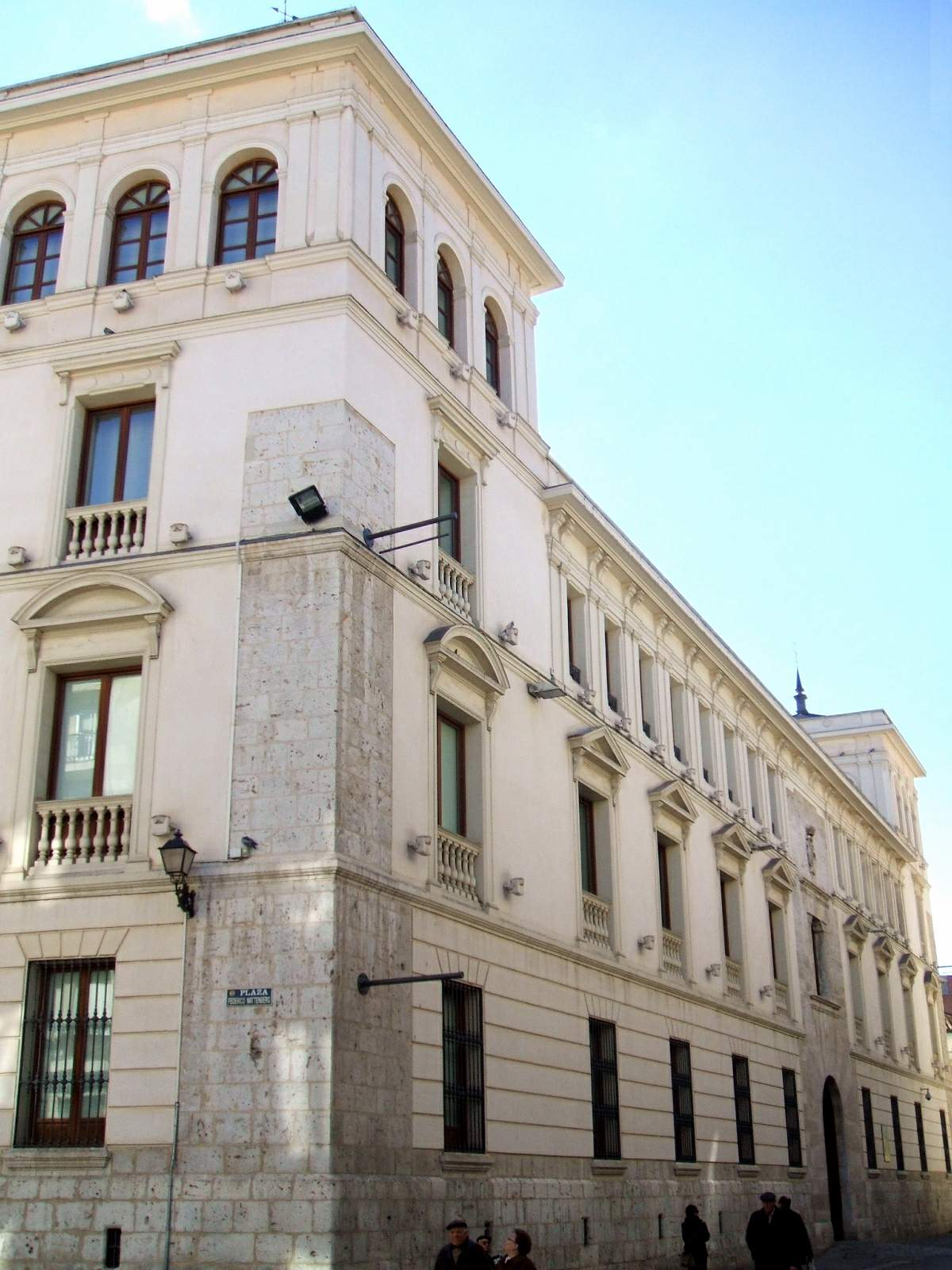 Valladolid - Palacio de Villena (Museo Nacional de Escultura)